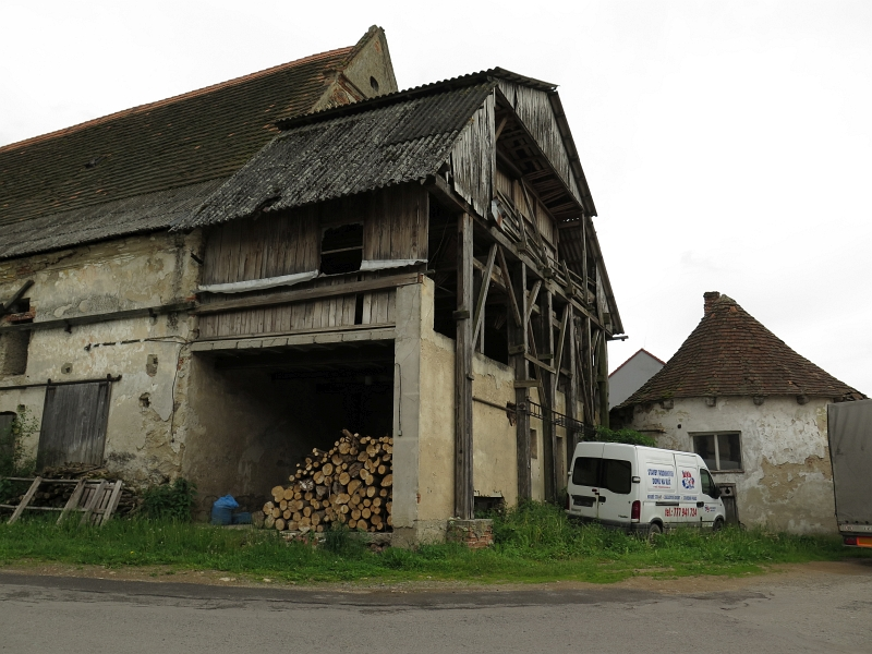 Tvrz, Jistebnice 9, Jistebnice.